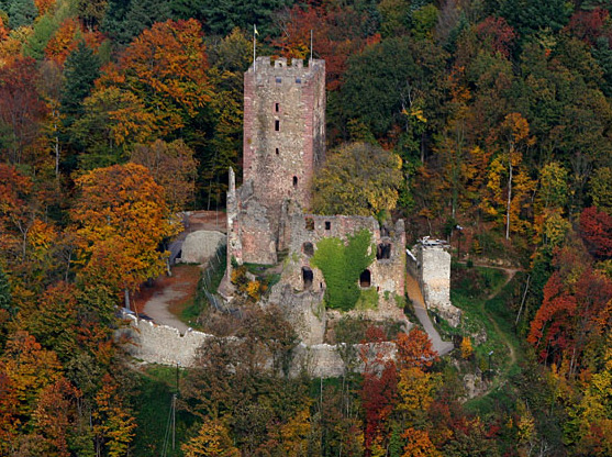 Luftaufnahme Kastelburg im Breisgau